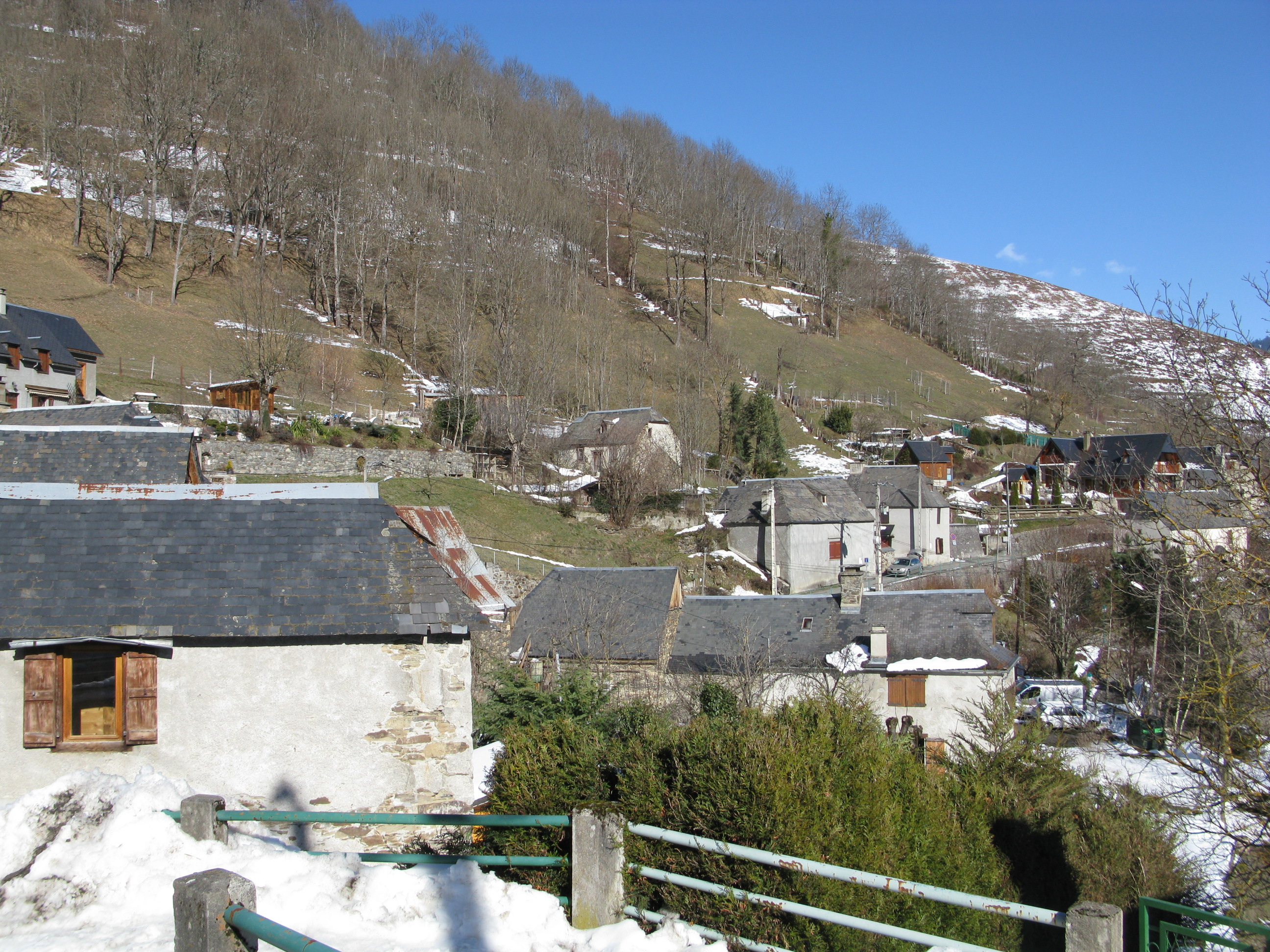 Vue d'ensemble de Barrancoueu